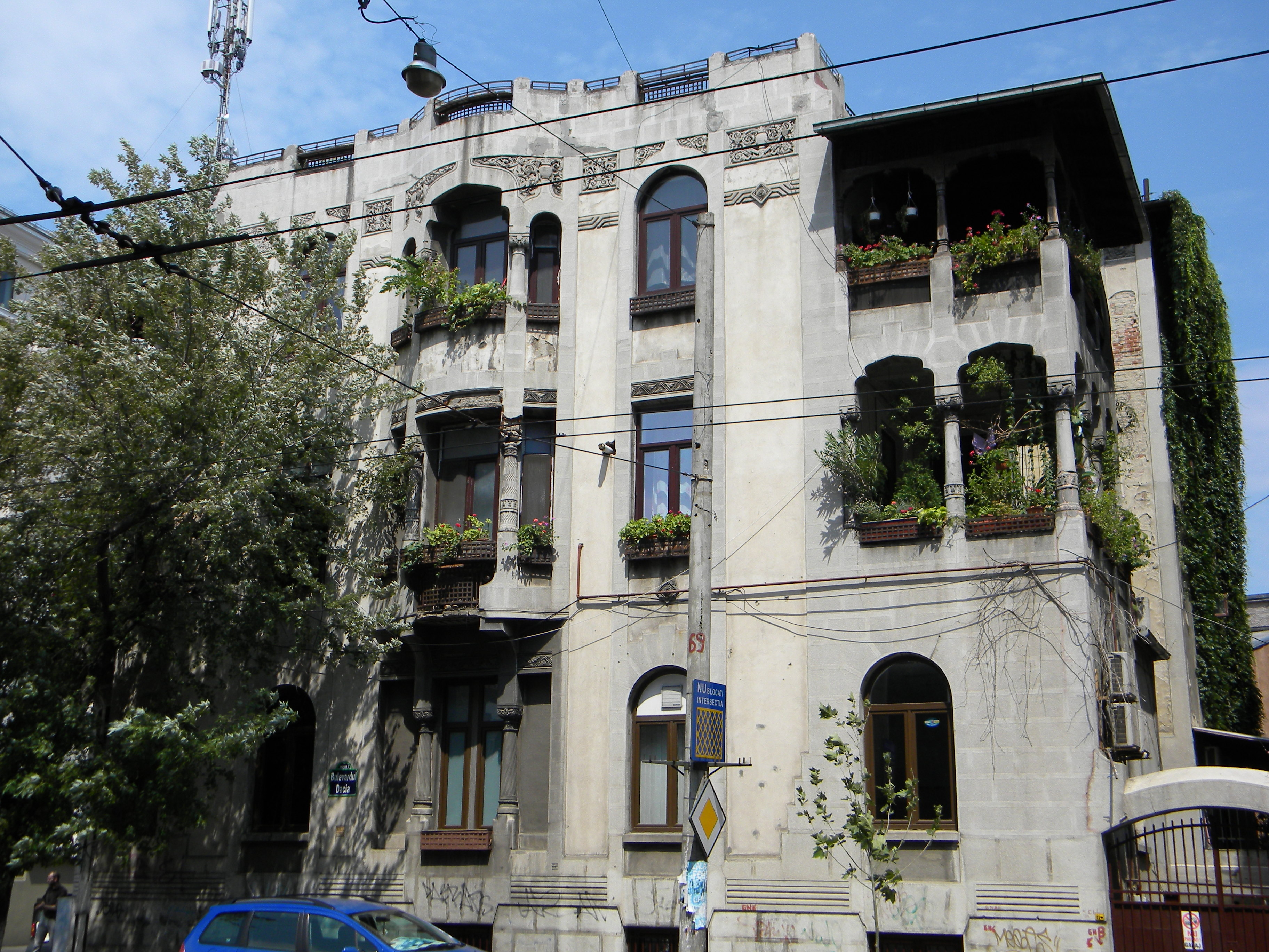 Imobil pe Bd. Dacia, nr. 101, Bucuresti